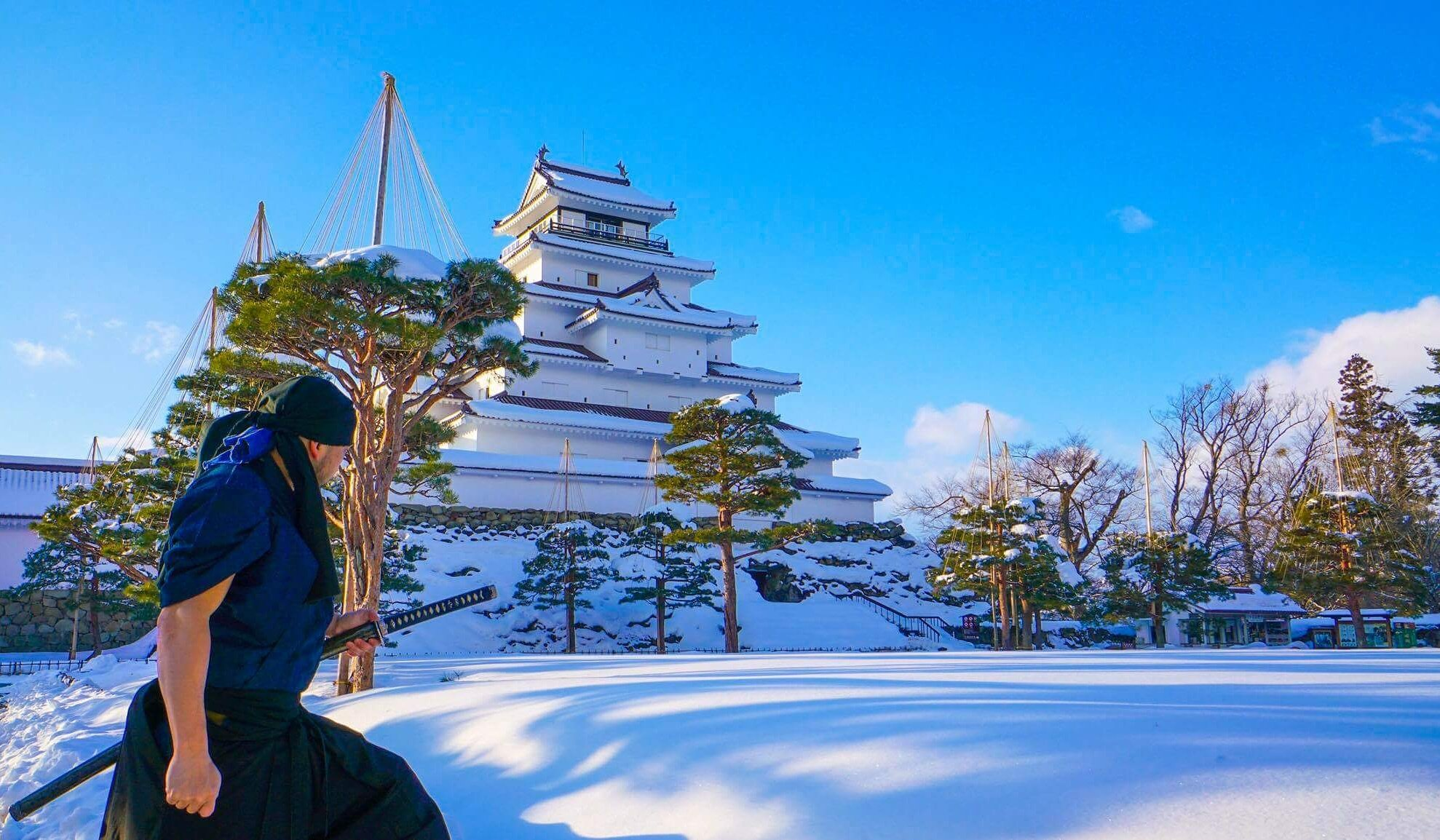 2017年ダイアモンドルート